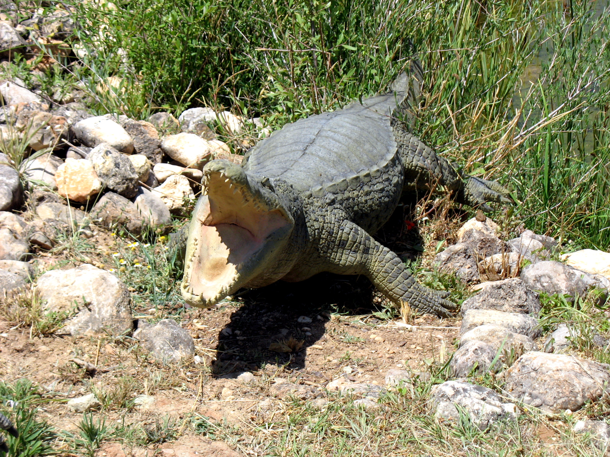 Goniopholis de Las Hoyas. Museo Paleontológico de Castilla-La Mancha (Cuenca)